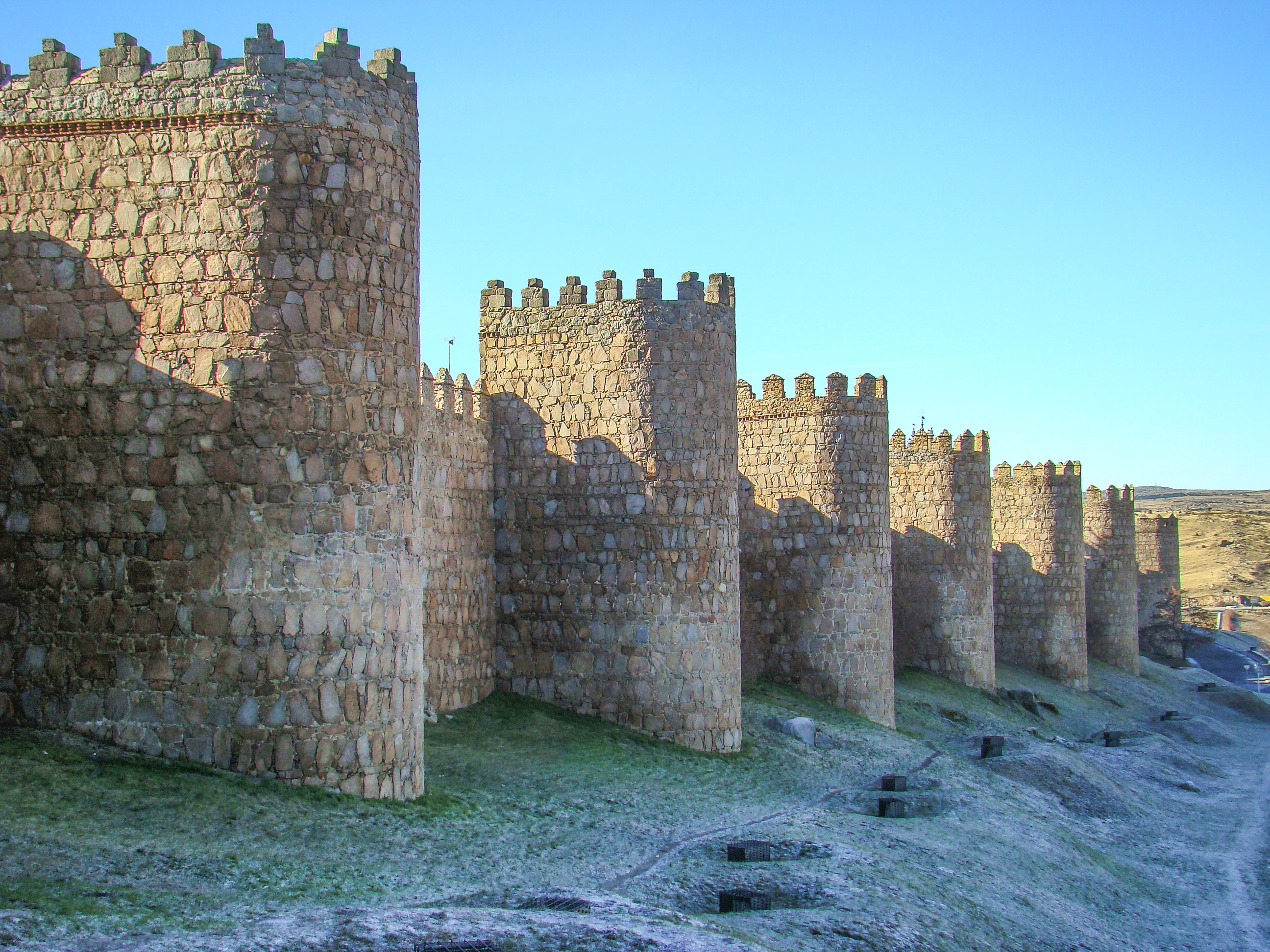 Murallas románicas de Ávila (España).